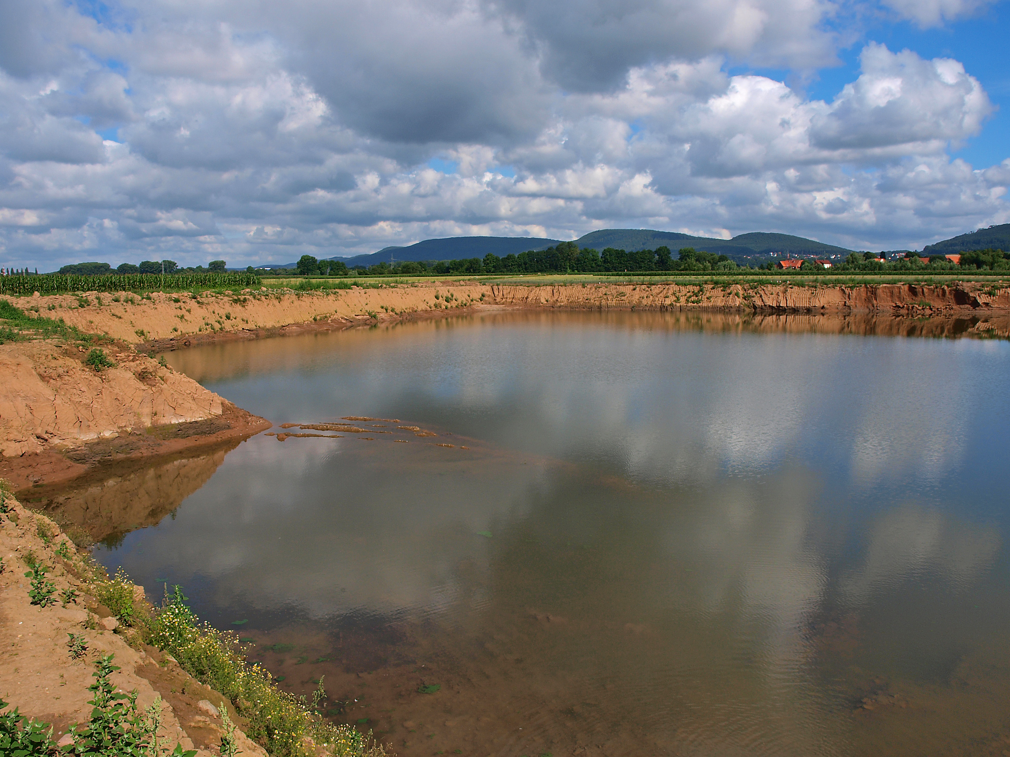 Naturschutzgebiet „Auenlandschaft Hohenrode“ (NSG HA 222) in Rinteln: Frisch abgebaggerte Steilwände im westlichen Bereich der Auenlandschaft.